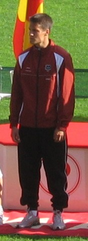 Jarno Kivioja Kalevan kisoissa, Ratinan stadionilla, Tampereella, 26. heinäkuuta 2008